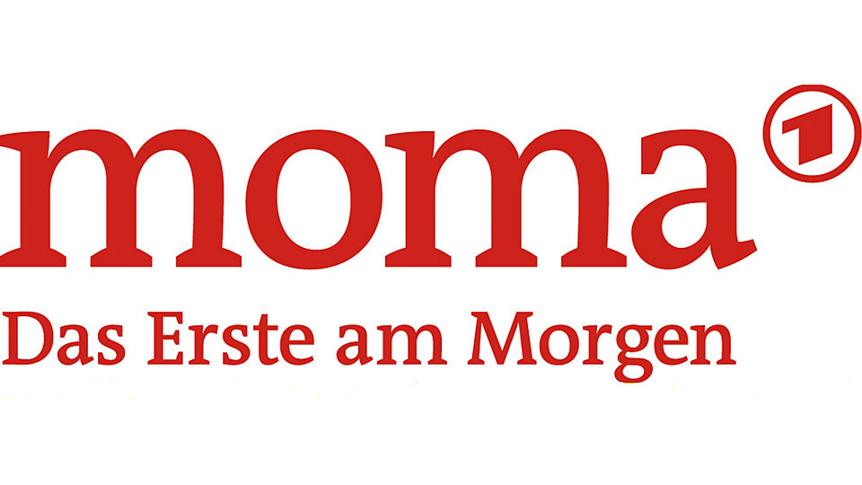 DIe ist das alte Logo des ARD-Morgenmagazins welches vor 2017 genutzt wurde